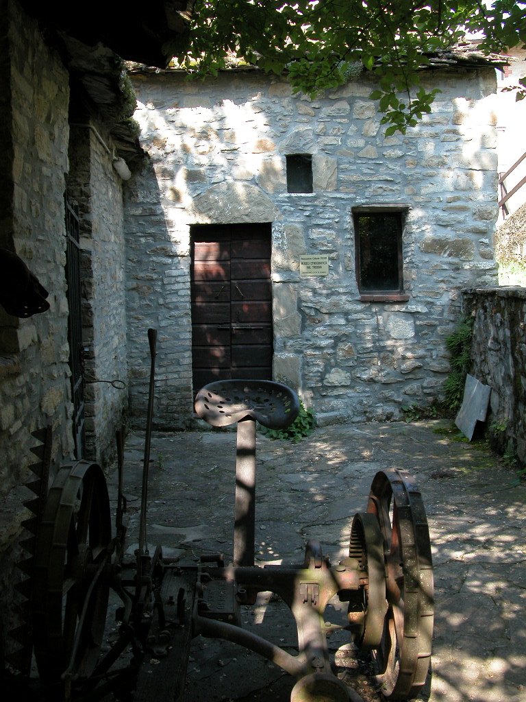 Foto mia personale, ingresso del museo etnografico val Trebbia, località Callegari, Cassolo, Bobbio (PC), 2008